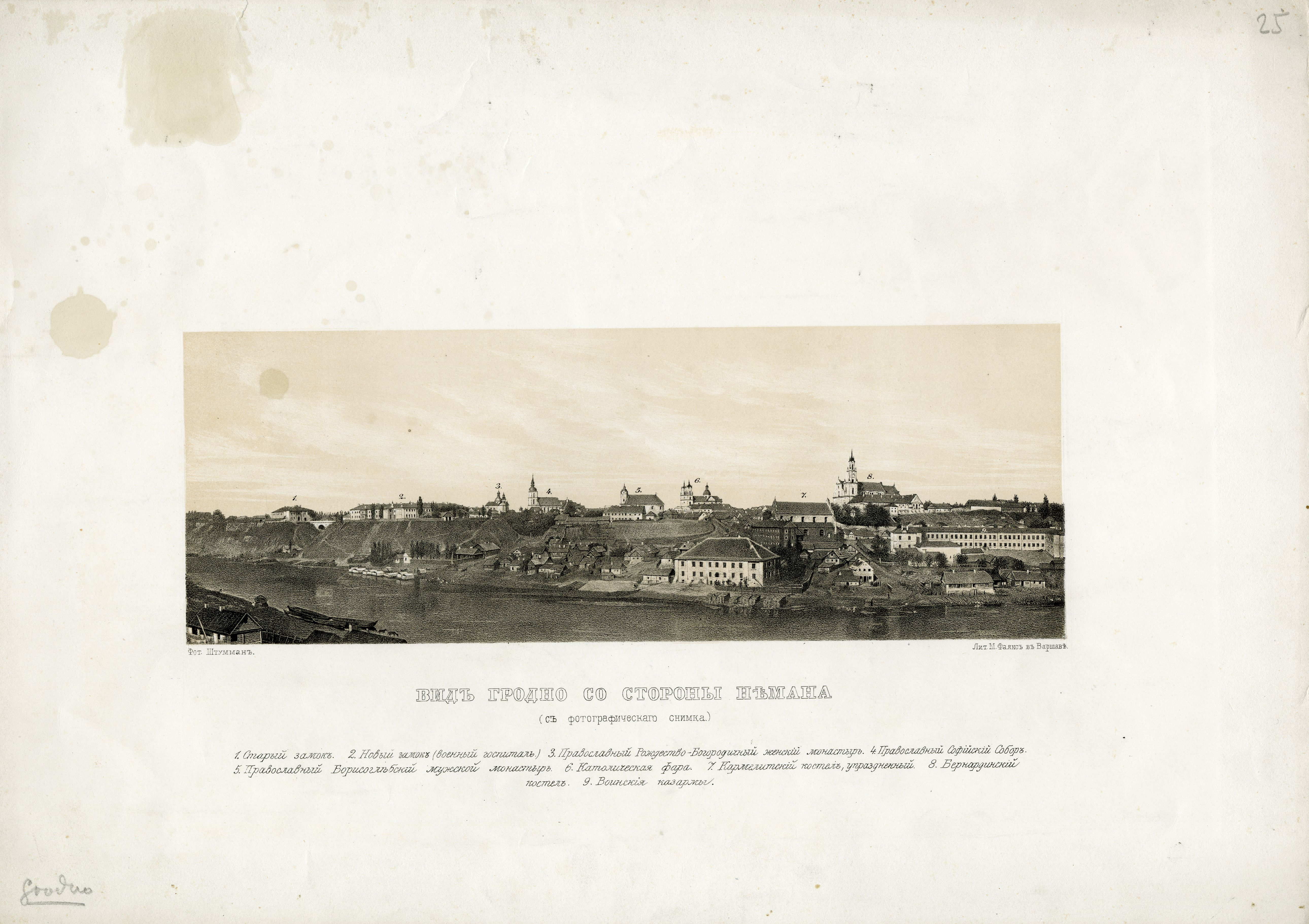 Беларуская (тарашкевіца): Горадня (Horadnia) з боку ракі Нёмана